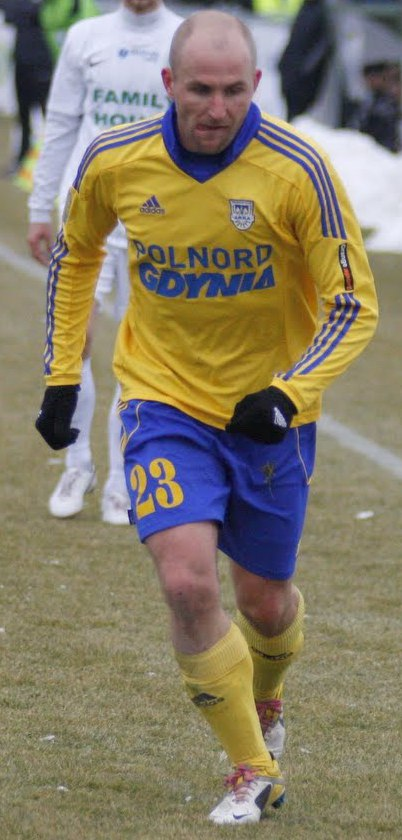 Rafał Grzelak podczas gry dla Arki Gdynia